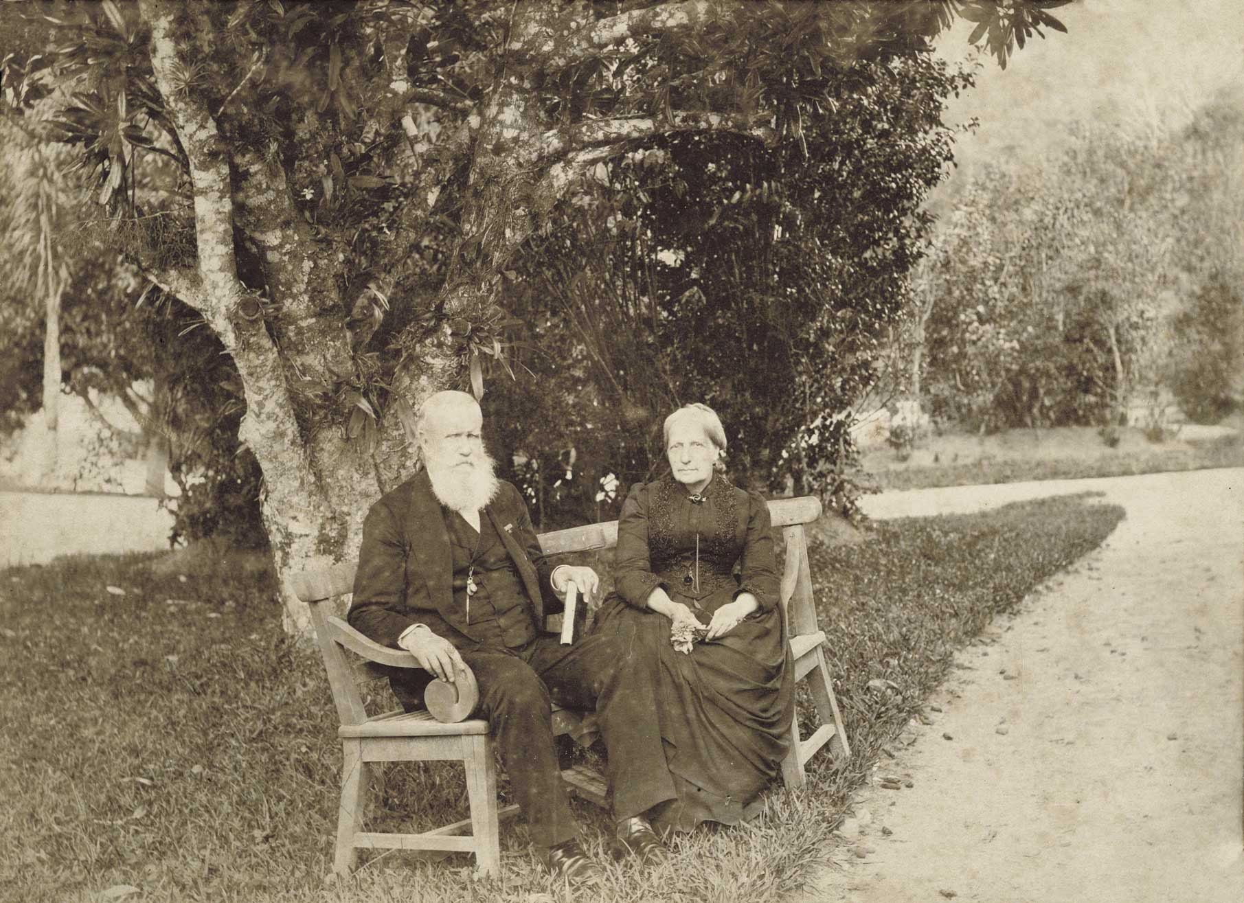 D. Pedro II e a Imperatriz Teresa Cristina nos jardins do Palácio Imperial de Petrópolis, estado do Rio de Janeiro, Brasil.